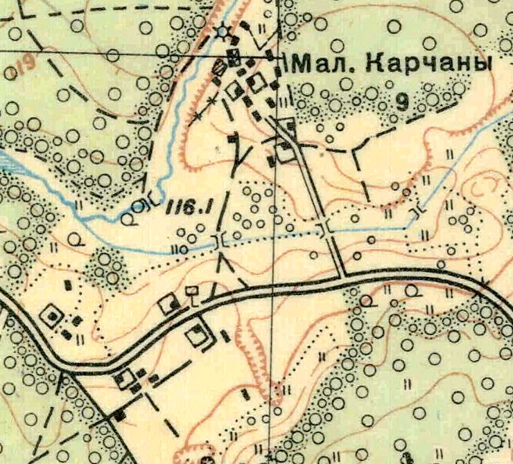 Топографическая карта Ленинградской области, квадрат О-35-23-А-в (Бол. Карчаны), деревня Малые Корчаны